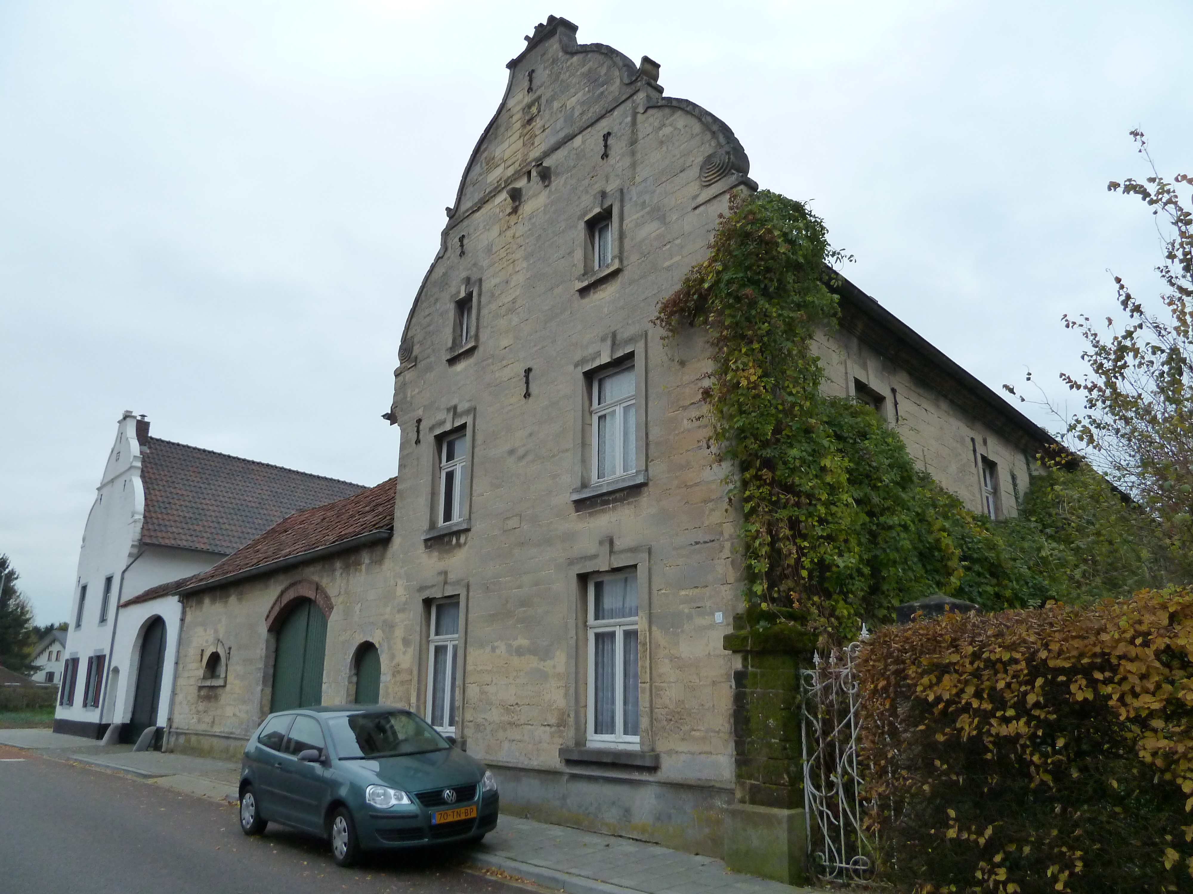 Voor- en zijgevel Kampstraat 13